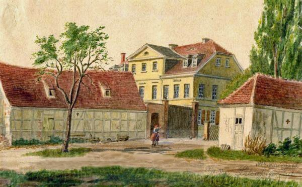 Aquarell vom Gut Schleußig